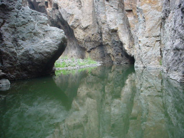 Cañón de Somoto (Nicaragua)